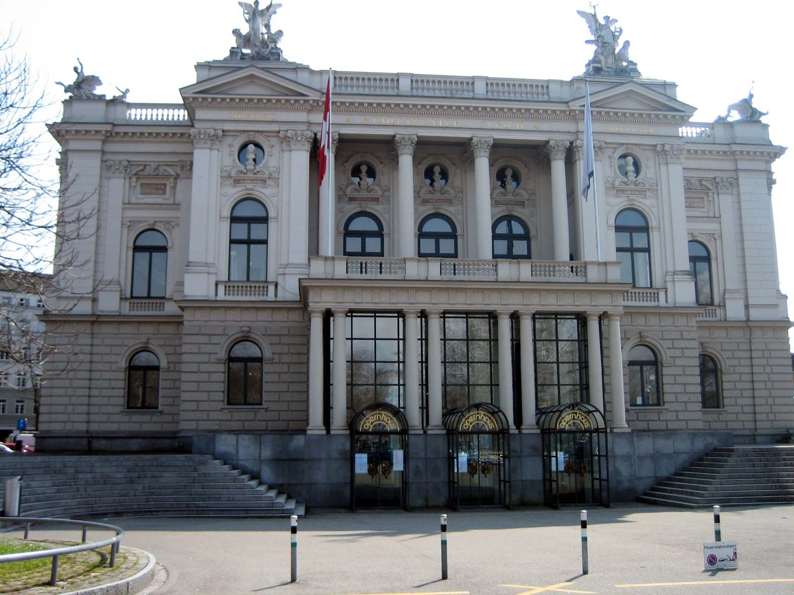 Opernhaus Zürich, März 2007